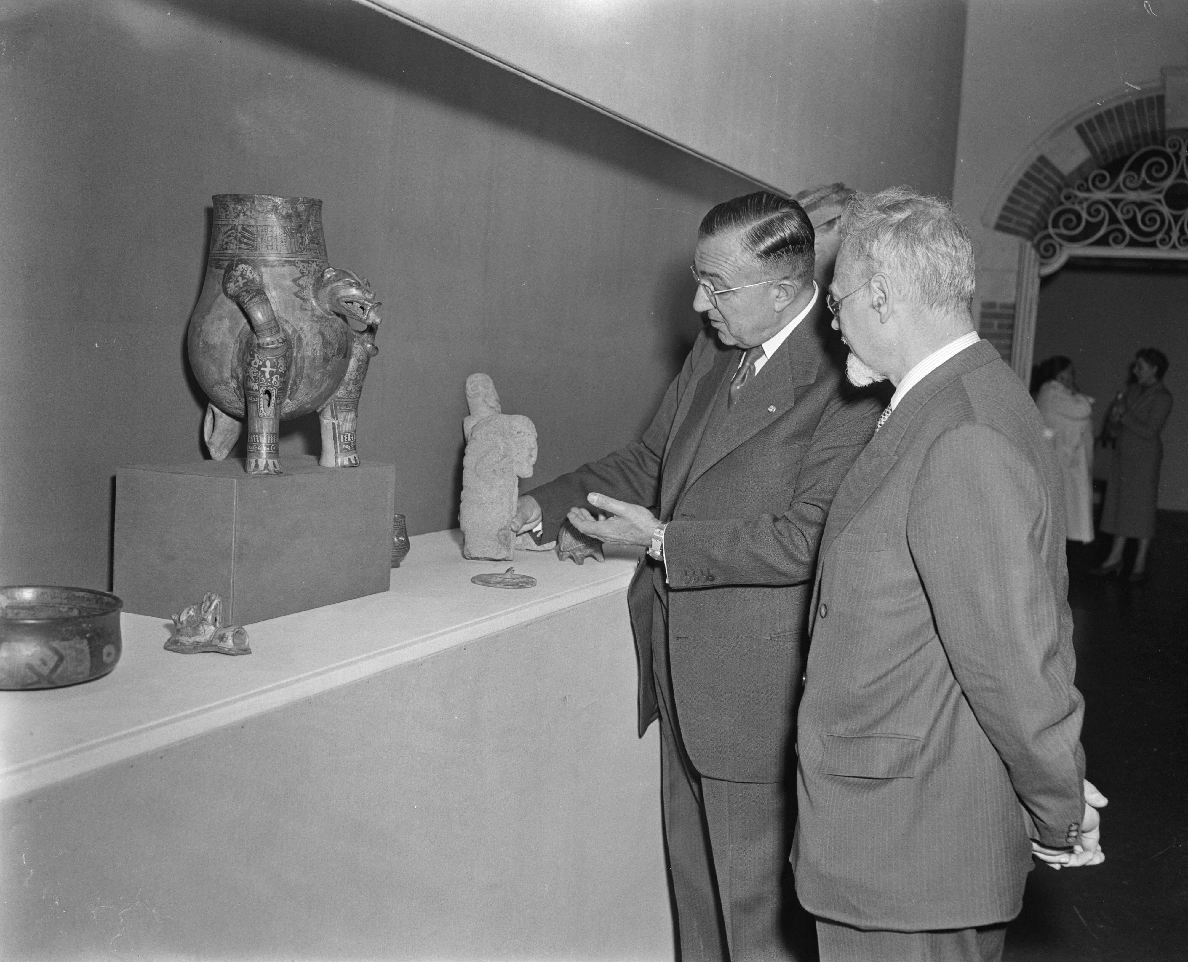 Collectie / Archief : Fotocollectie Anefo Reportage / Serie : [ onbekend ] Beschrijving : Tentoonstelling Centraal Amerikas onbekende schatten, Tropenmuseum Amsterdam Datum : 18 juni 1956 Locatie : Amsterdam, Noord-Holland Trefwoorden : SCHATTEN, tentoonstellingen Instellingsnaam : Tropenmuseum Fotograaf : Pot, Harry / Anefo Auteursrechthebbende : Nationaal Archief Materiaalsoort : Negatief (zwart/wit) Nummer archiefinventaris : bekijk toegang 2.24.01.04 Bestanddeelnummer : 907-8327